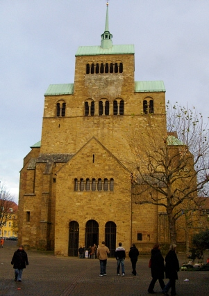 Hauptportal des Doms zum Minden in Minden (Westf.), Nordrhein-Westfalen.